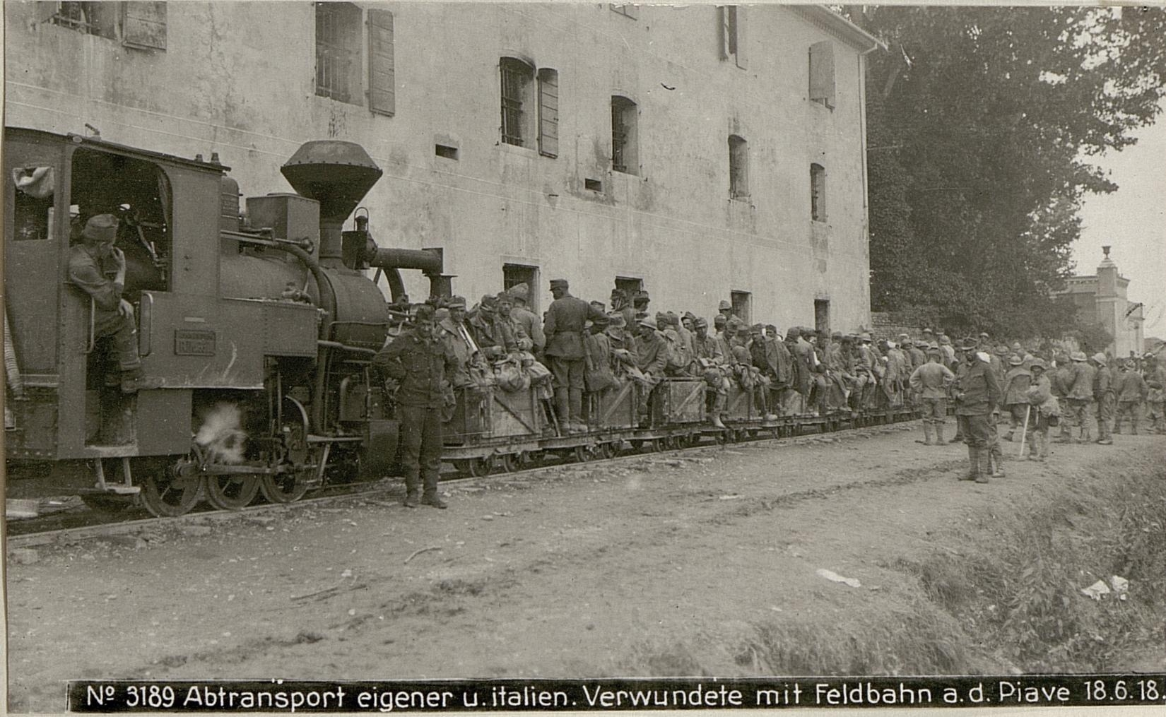 Abtransport eigener u.italien.Verwundete mit Feldbahn a.d.Piave 18.6.18.